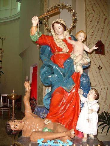 Simone 2006